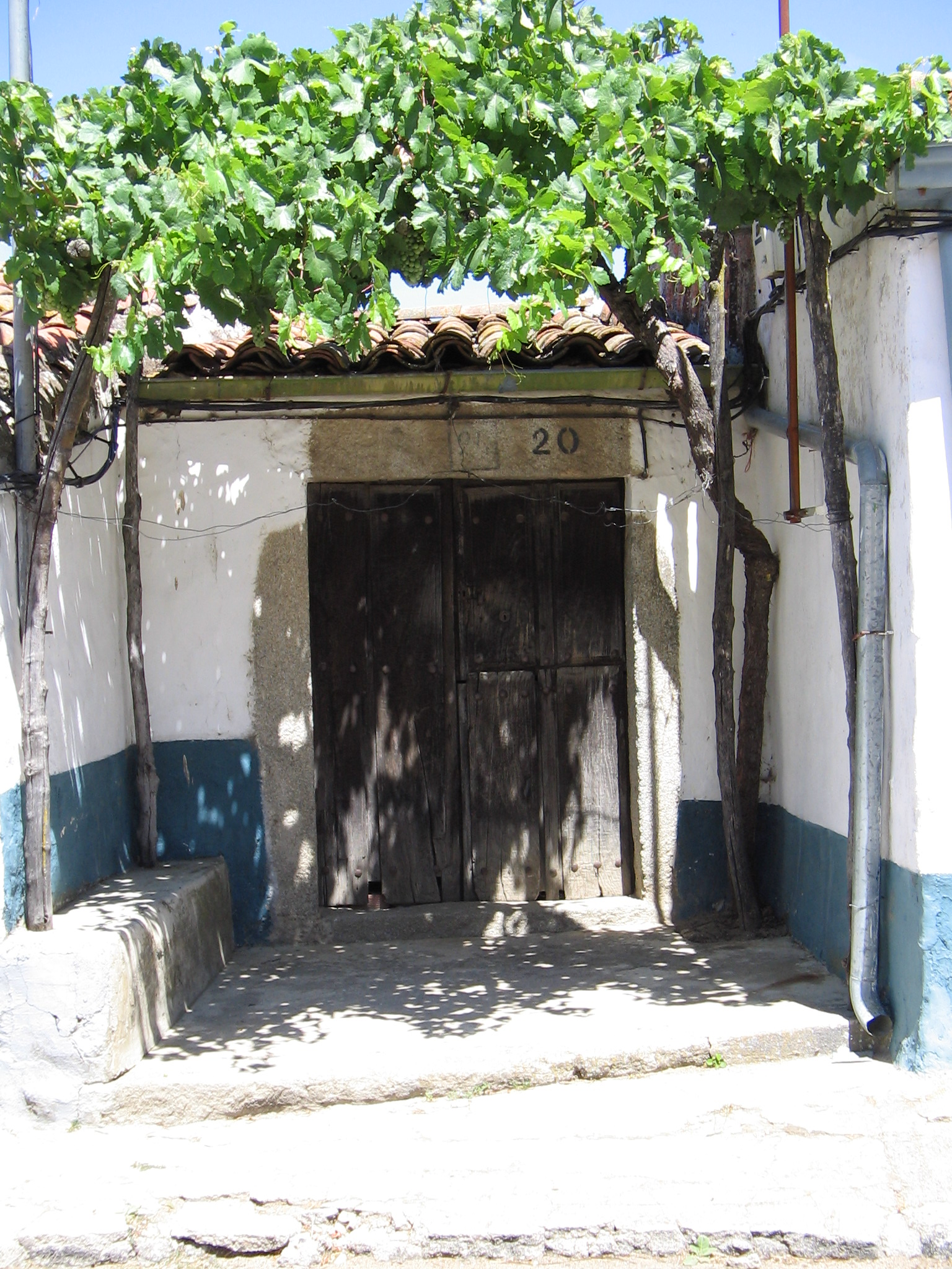 Fuentes de Béjar, casa antigua con más de 100 años y parra típica en la entrada junto a poyo punto de encuentro donde era frecuente ver a los vecinos descansar de los rigores del verano castellano sobretodo por las noches.